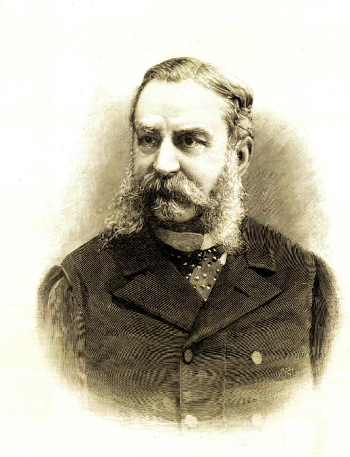 Antonio Aguilar y Correa, marqués de la Vega y Armijo, conde de Mós, Ministro de Estado